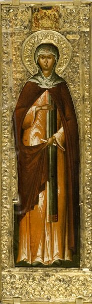 Музей «Новодевичий монастырь». Мерная икона с изображением Св. Преподобной Евдокии – принадлежала царевне Евдокии Алексеевне.